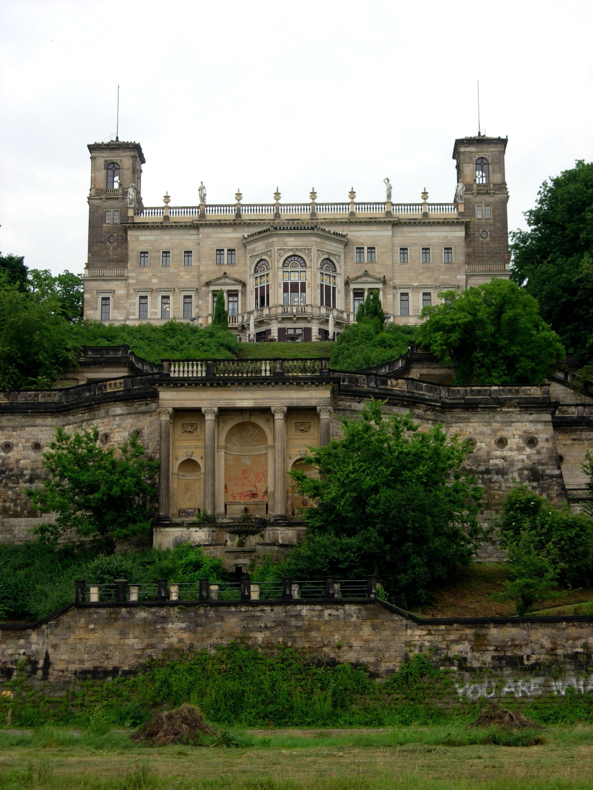 Schloss Albrechtsberg (Dresden), Elbseite